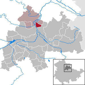 Griefstedt in Thuringia - District Sömmerda